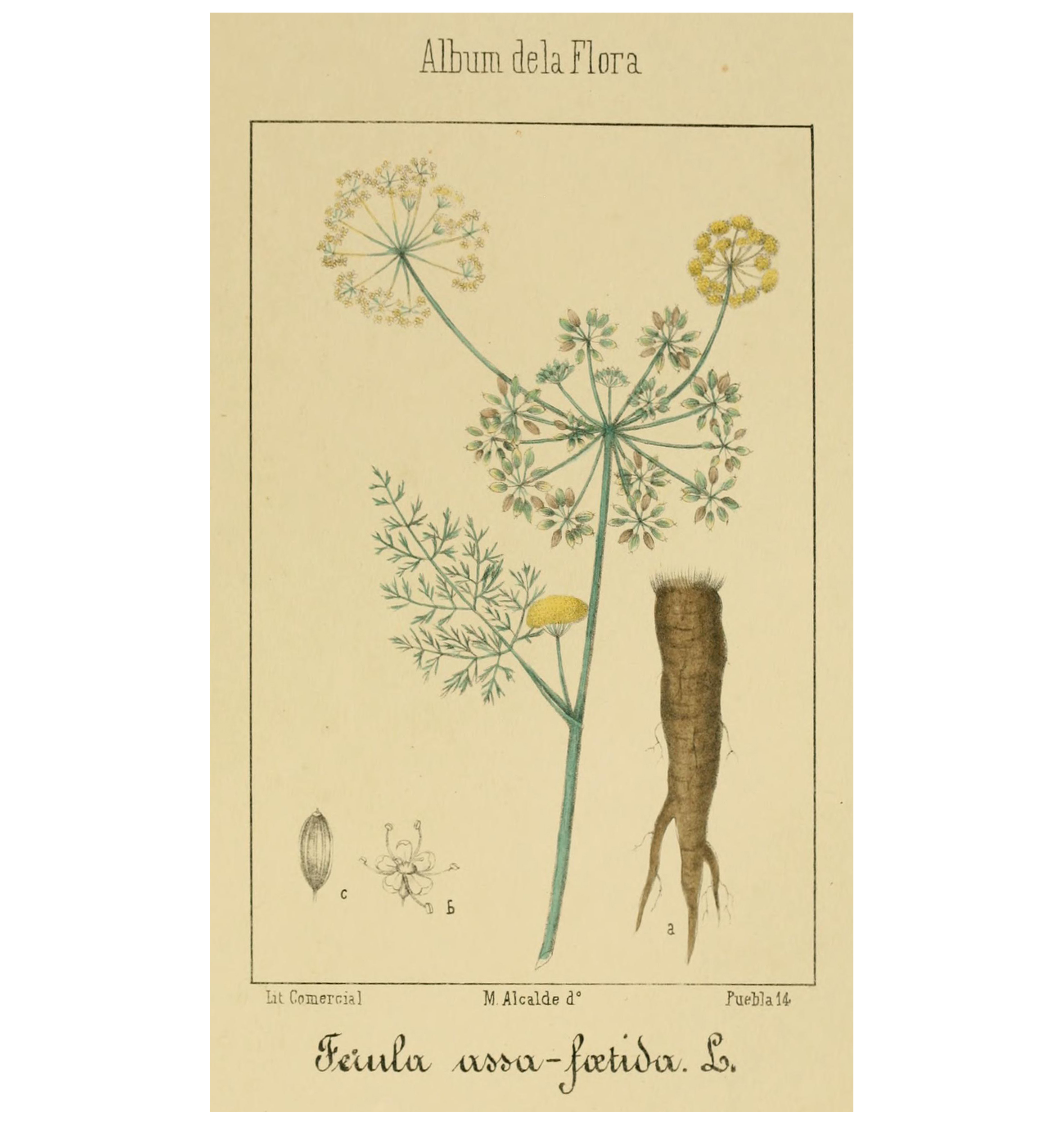 Abbildung von Ferula assa-foetida